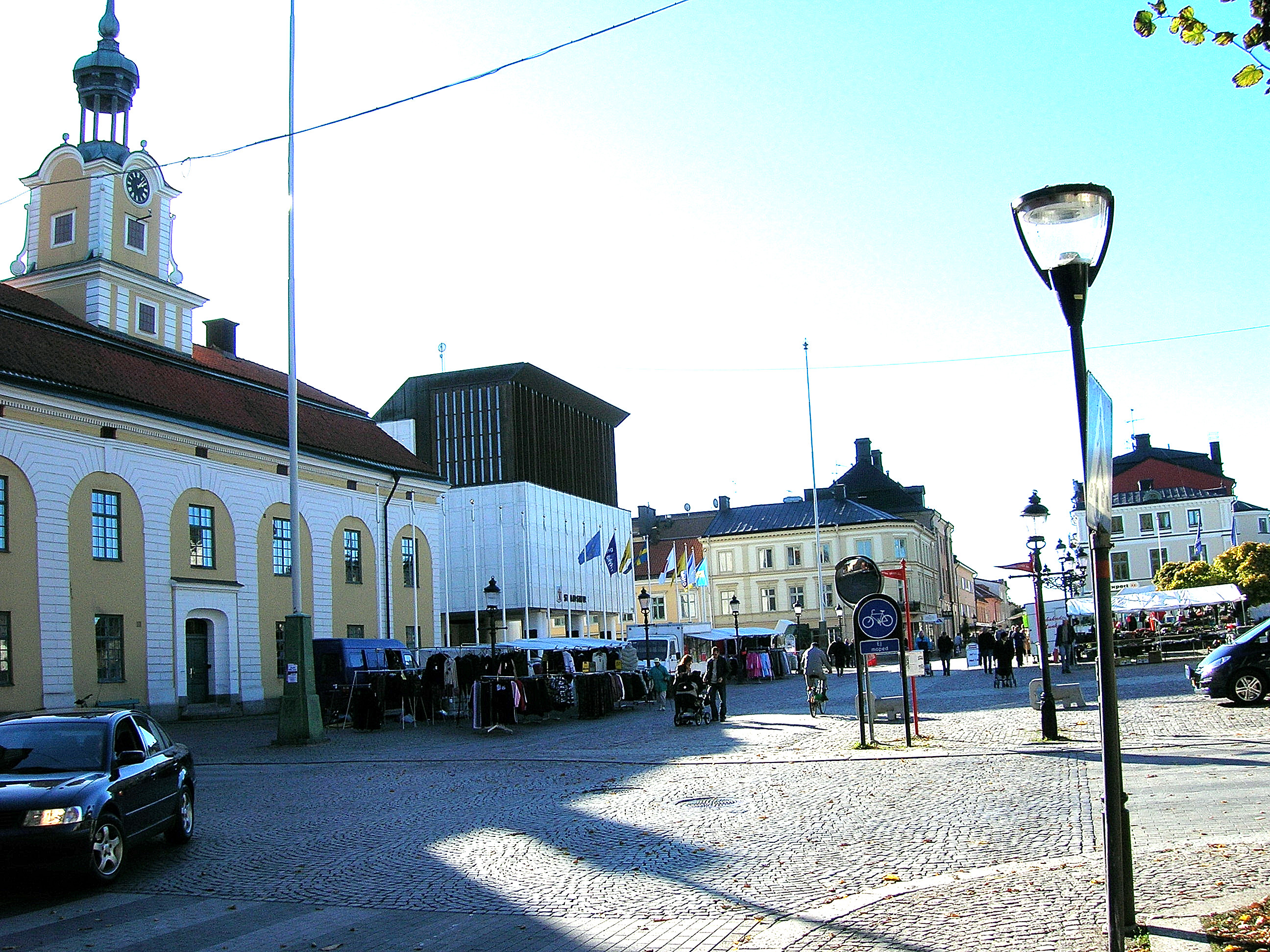 Stora torget i Nyköping hösten 2005 Photo: Niklas Nordblad